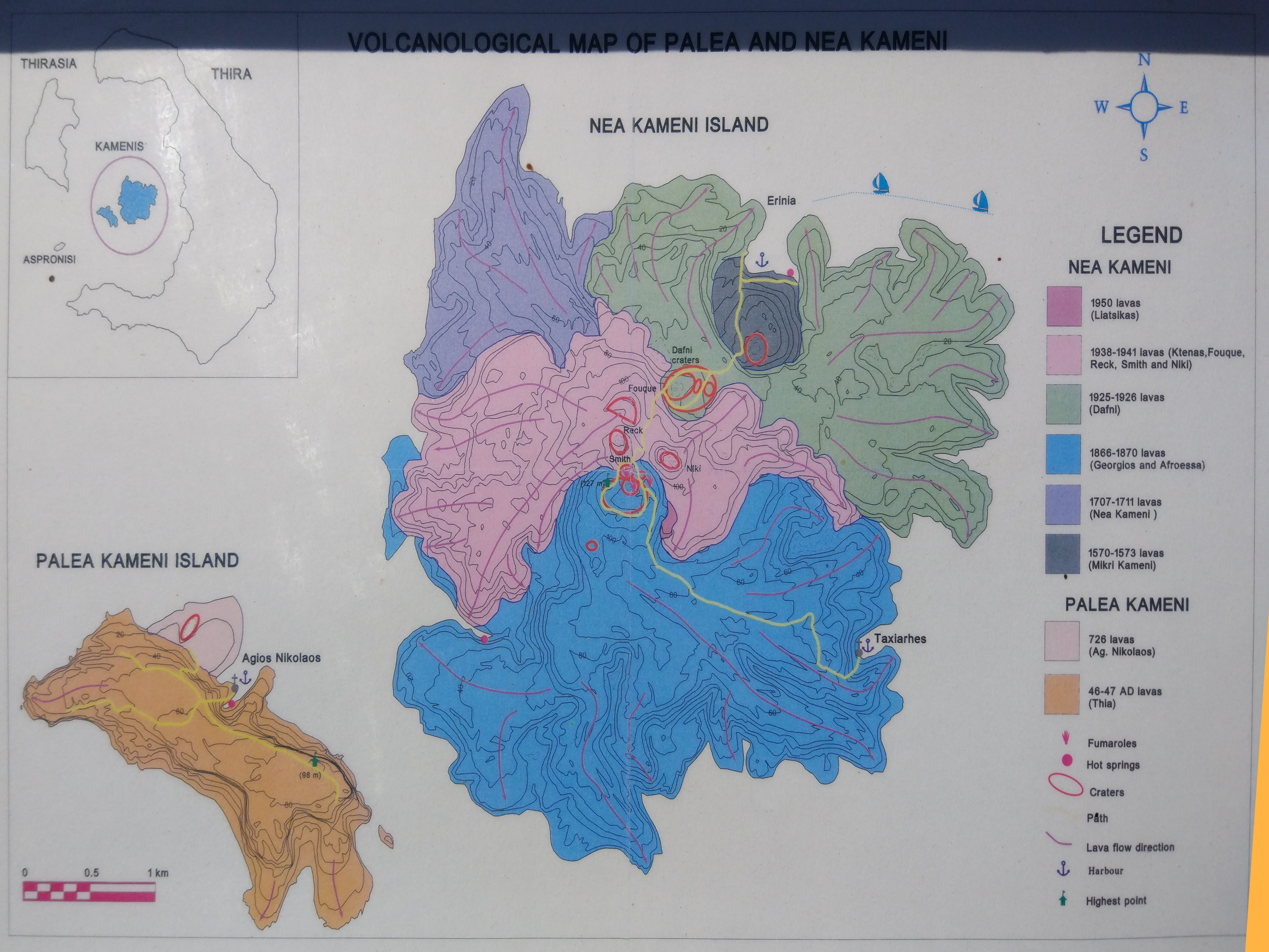 Geological map of Nea Kameni